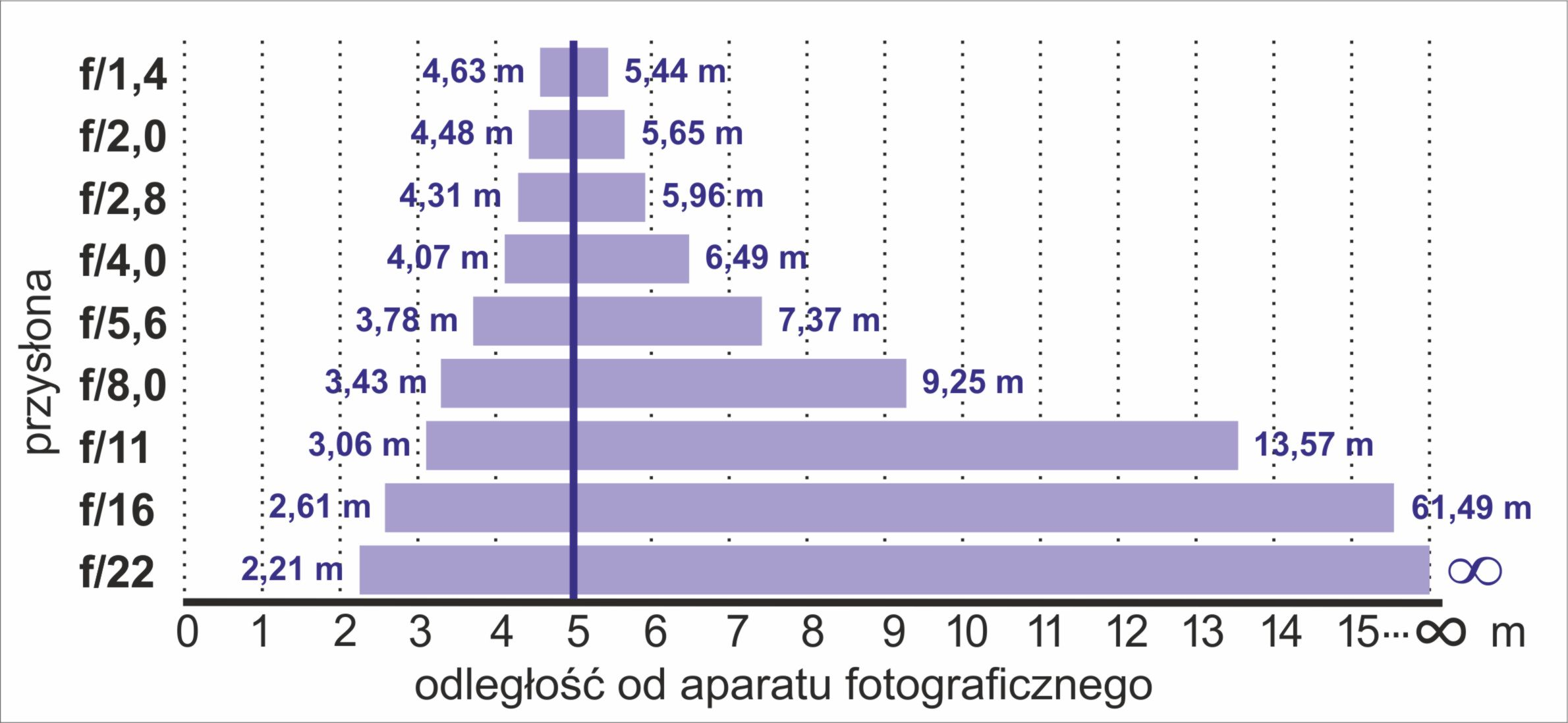 Wykres ilustrujący wpływ przysłony na głębię ostrości (matryca full frame, ogniskowa 50 mm, odległość ostrzenia 5 m)